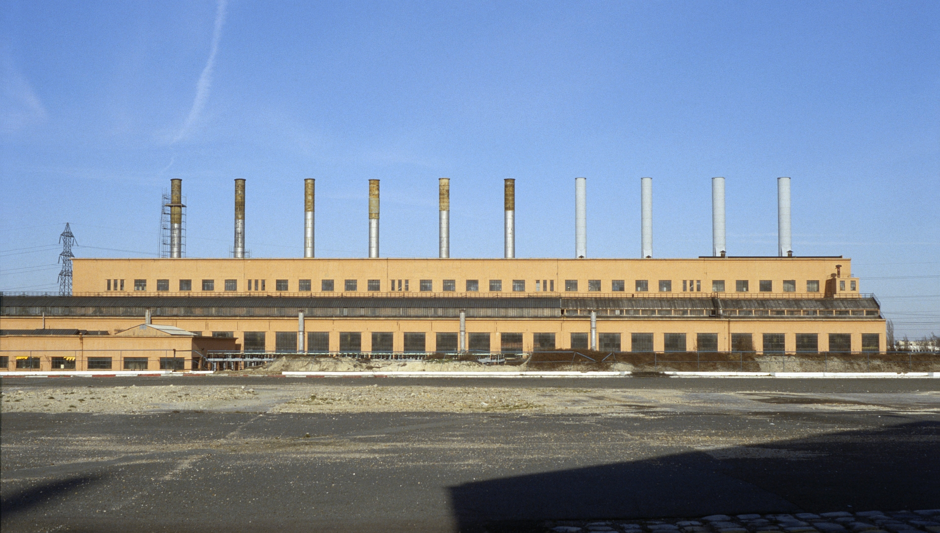 La centrale électrique de Saint-Denis (Seine-Saint-Denis, France).